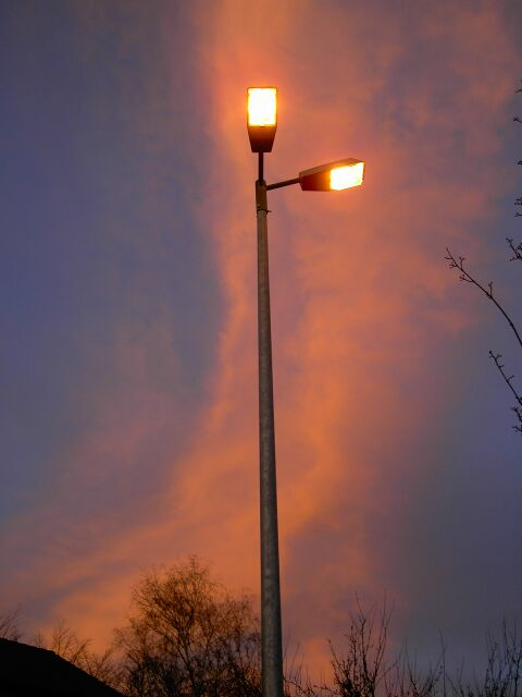 eingeschalteter Supermarkt-Lichtmast vor rotem Abendhimmel